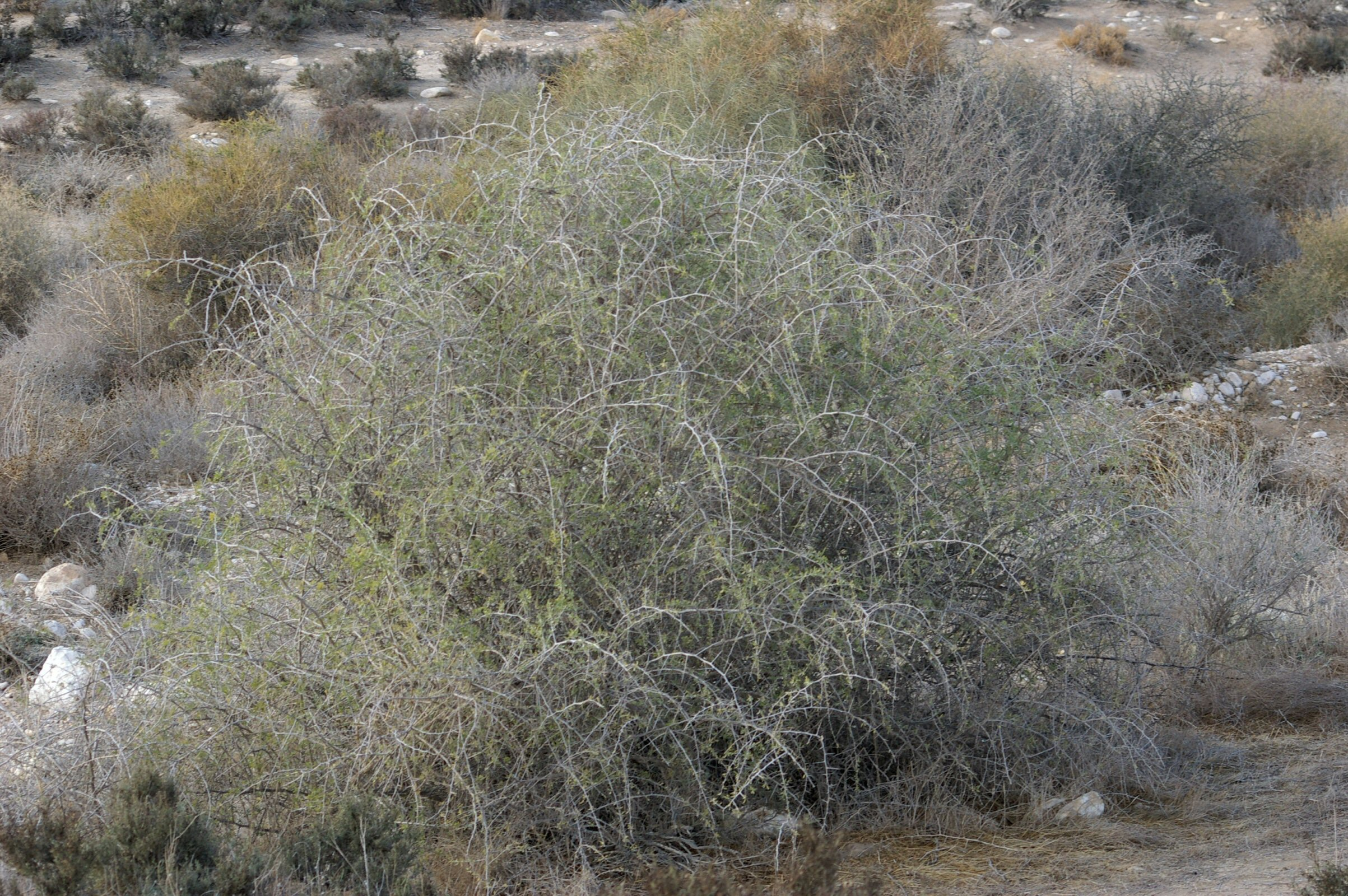 Lycium at Nitsana wadi.